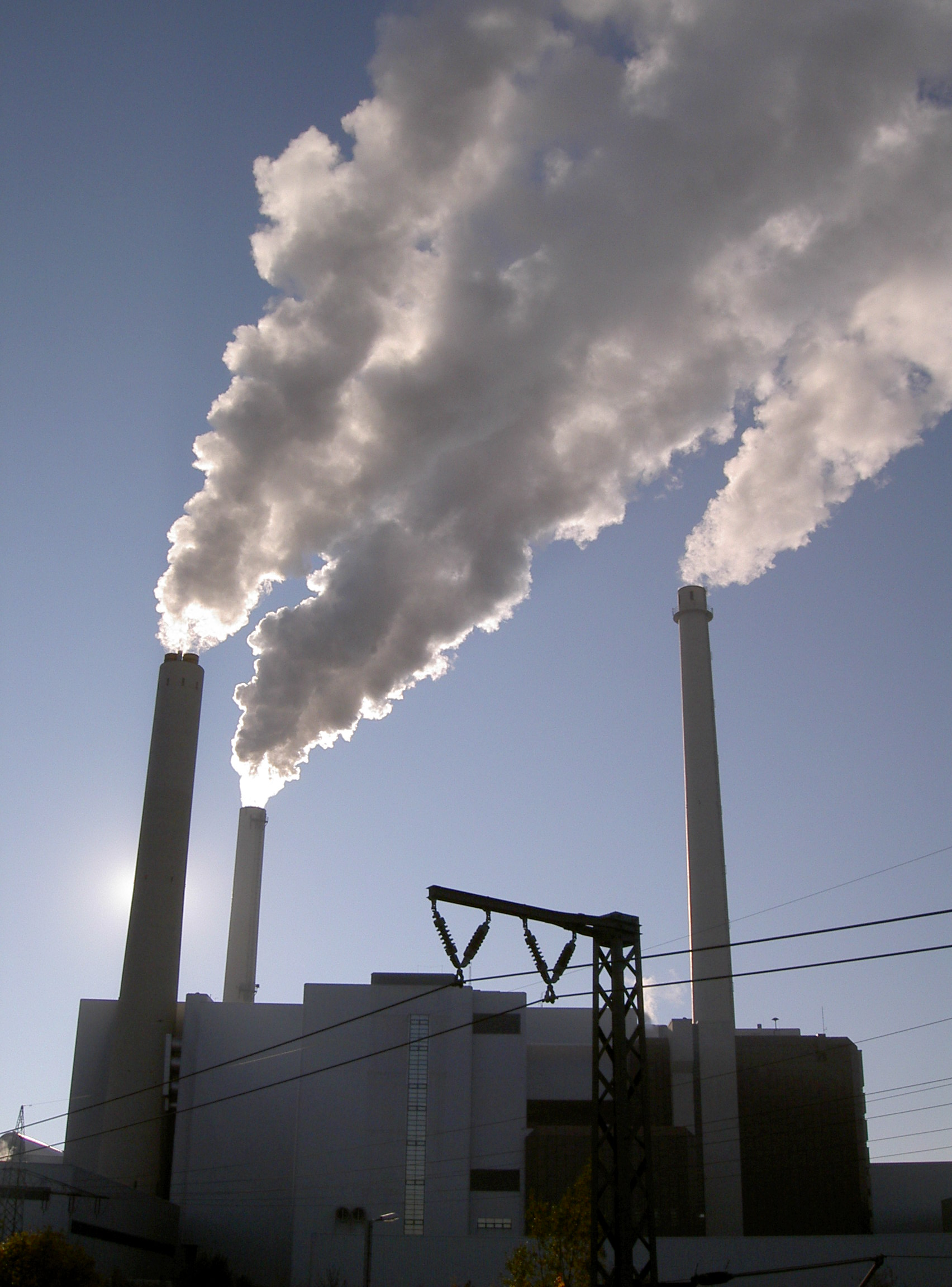 Heizkraftwerk Nord (Müllverbrennungsanlage) in München